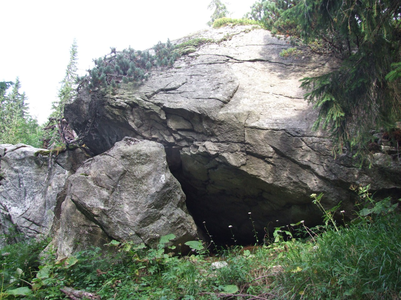 Koleba w Dolinie Hlińskiej (przy szlaku turystycznym)